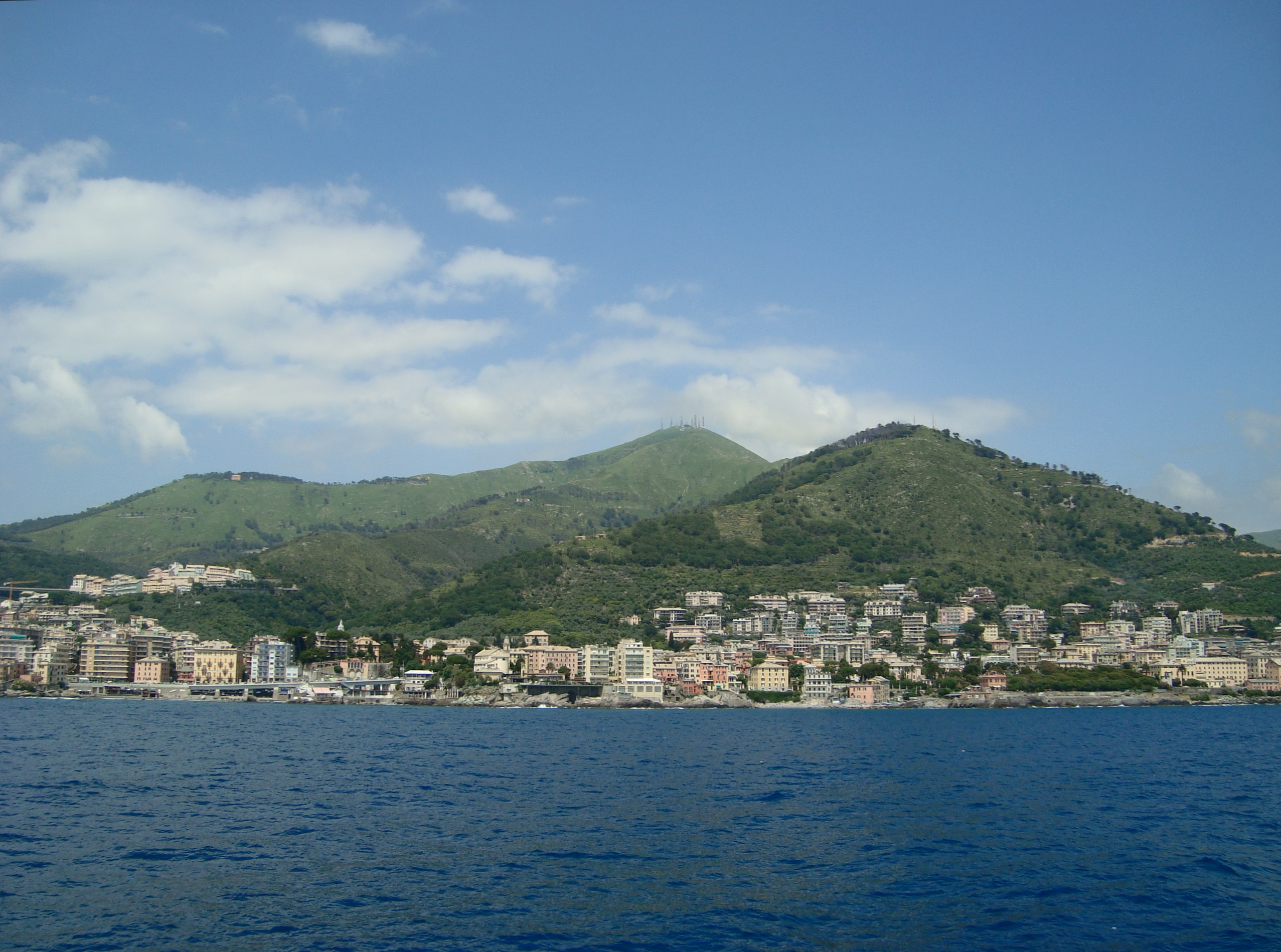 Quarto dei Mille